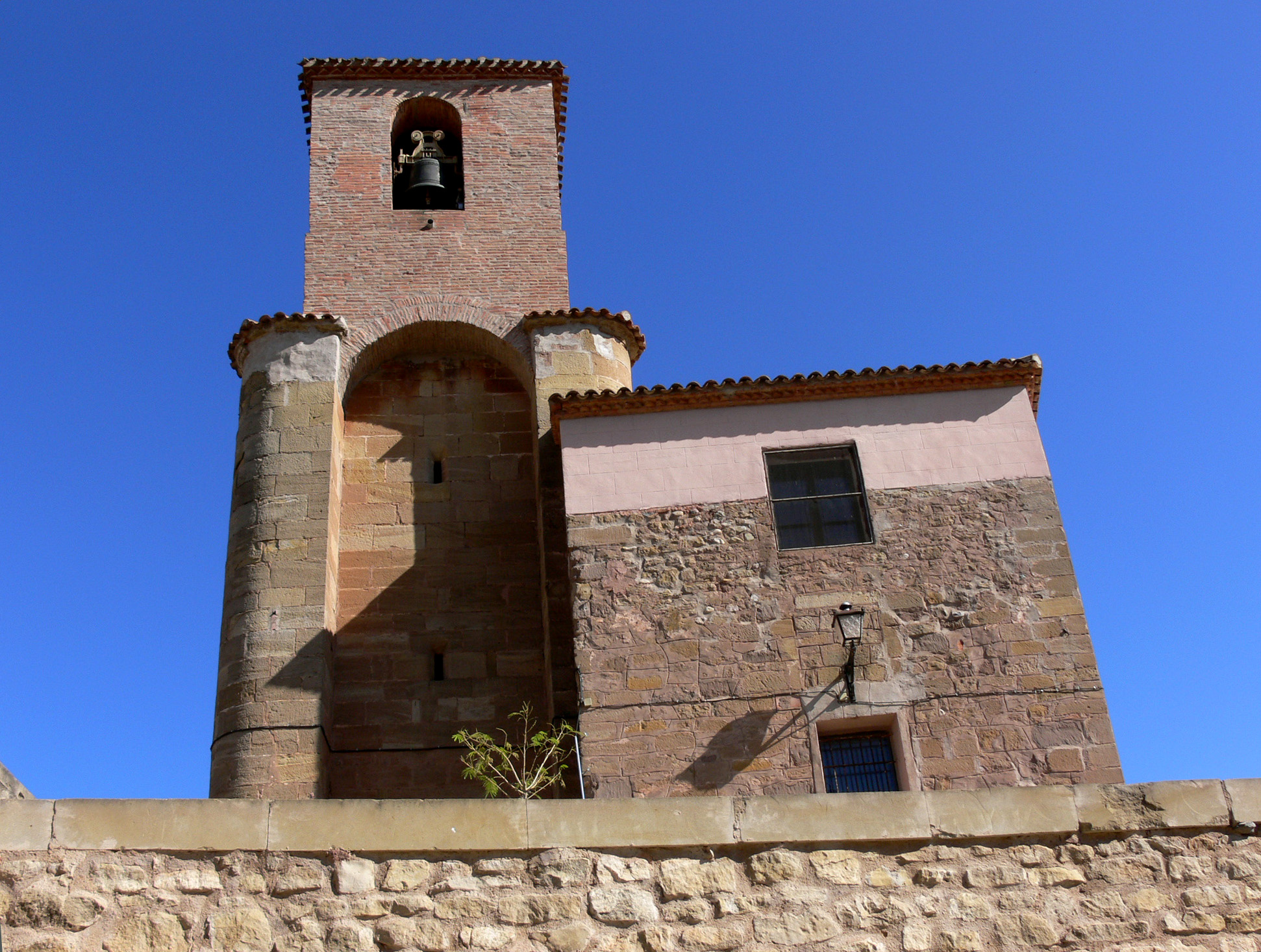 Iglesia de San Martín de Tours en Hormilla, La Rioja - España.